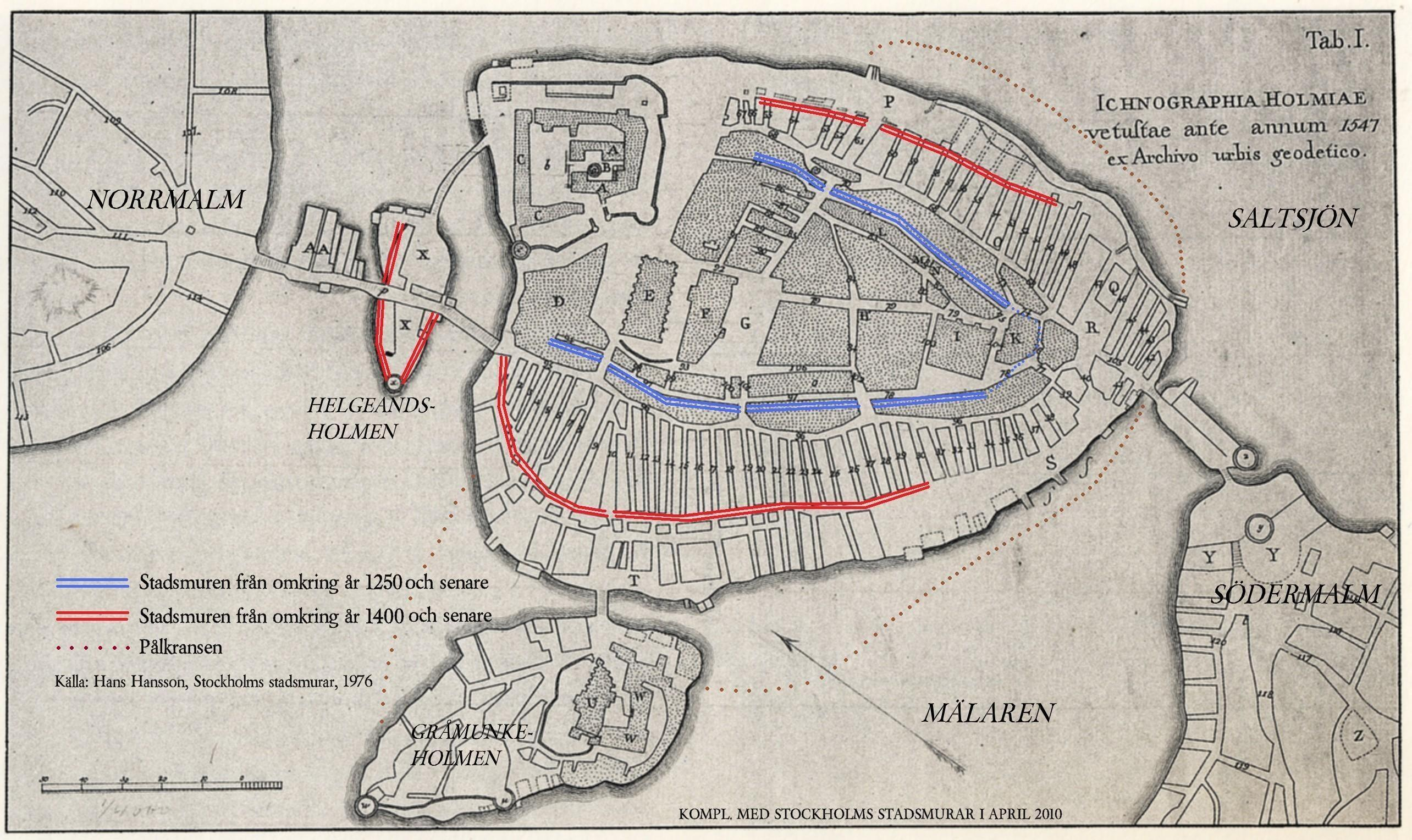 Karta visande Stockholm 1547 med Stockholms stadsmurar